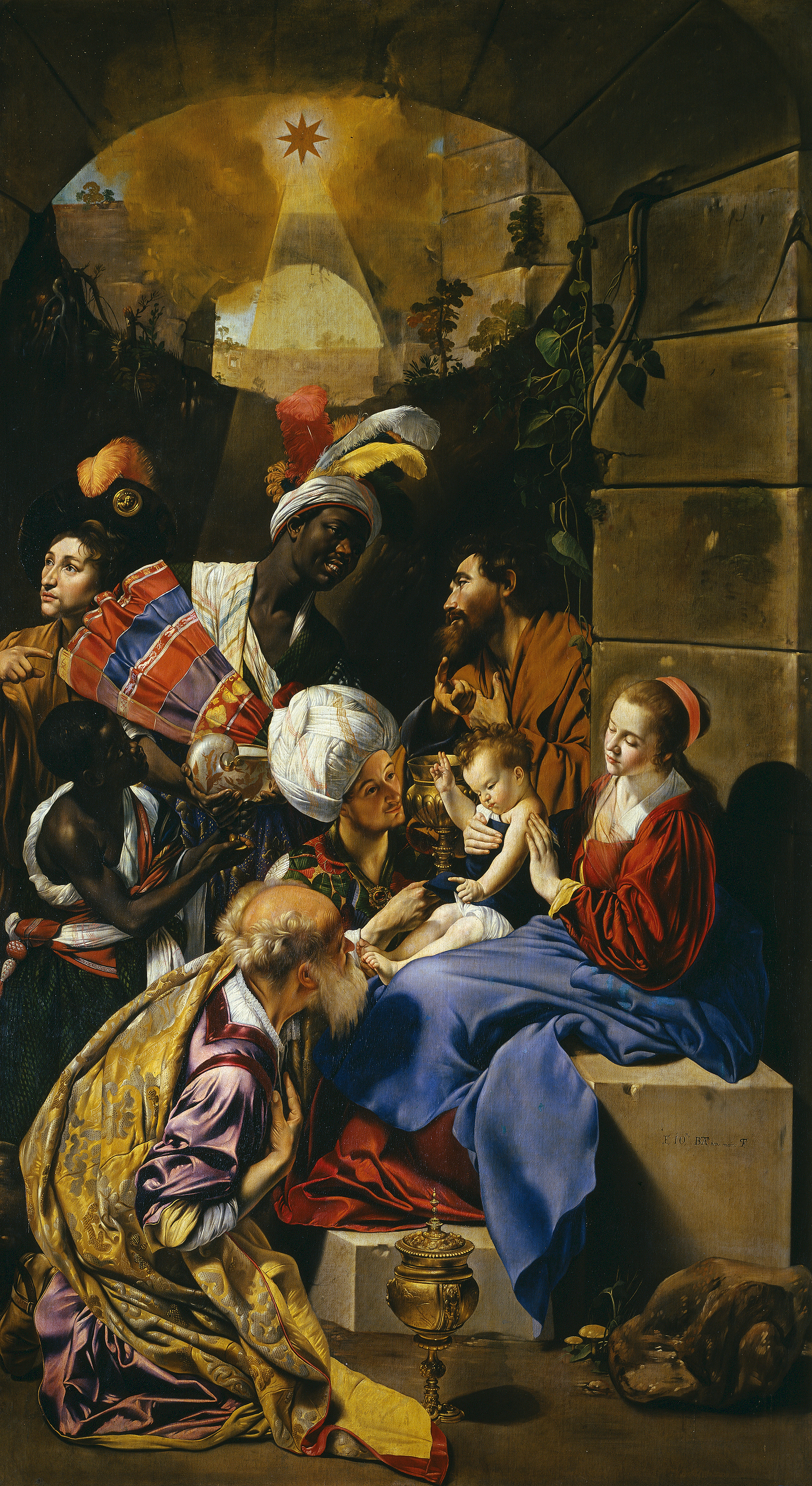 La obra representa el momento en que el Niño Jesús fue adorado por los tres reyes magos.